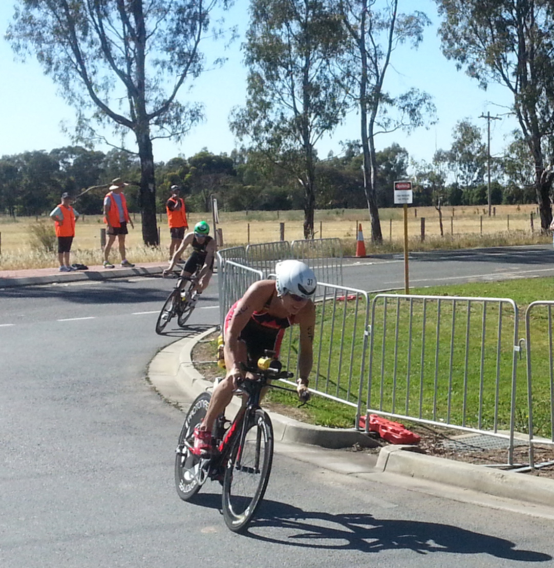 Melanie McQuaid 2013